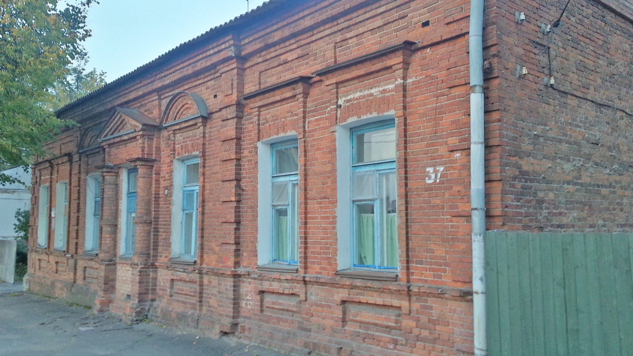 Беларуская (тарашкевіца): Забудова вул. Суворава. г. Віцебск This is a photo of Belarusian heritage monument. Reference number: 213Г000079 ( WLM)